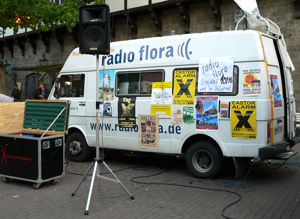 Ü Wagen von Radio Flora